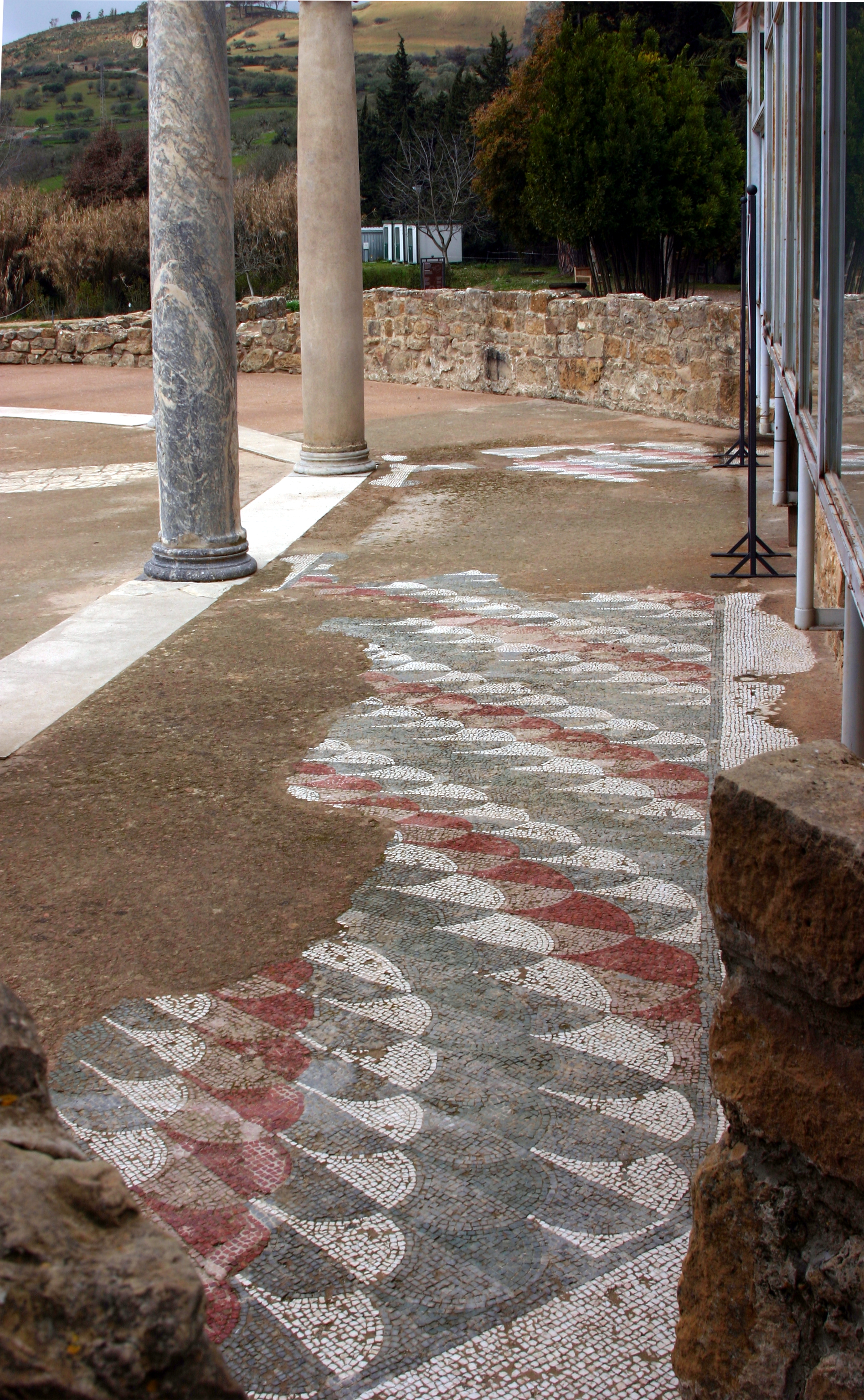 Villa Romana del Casale